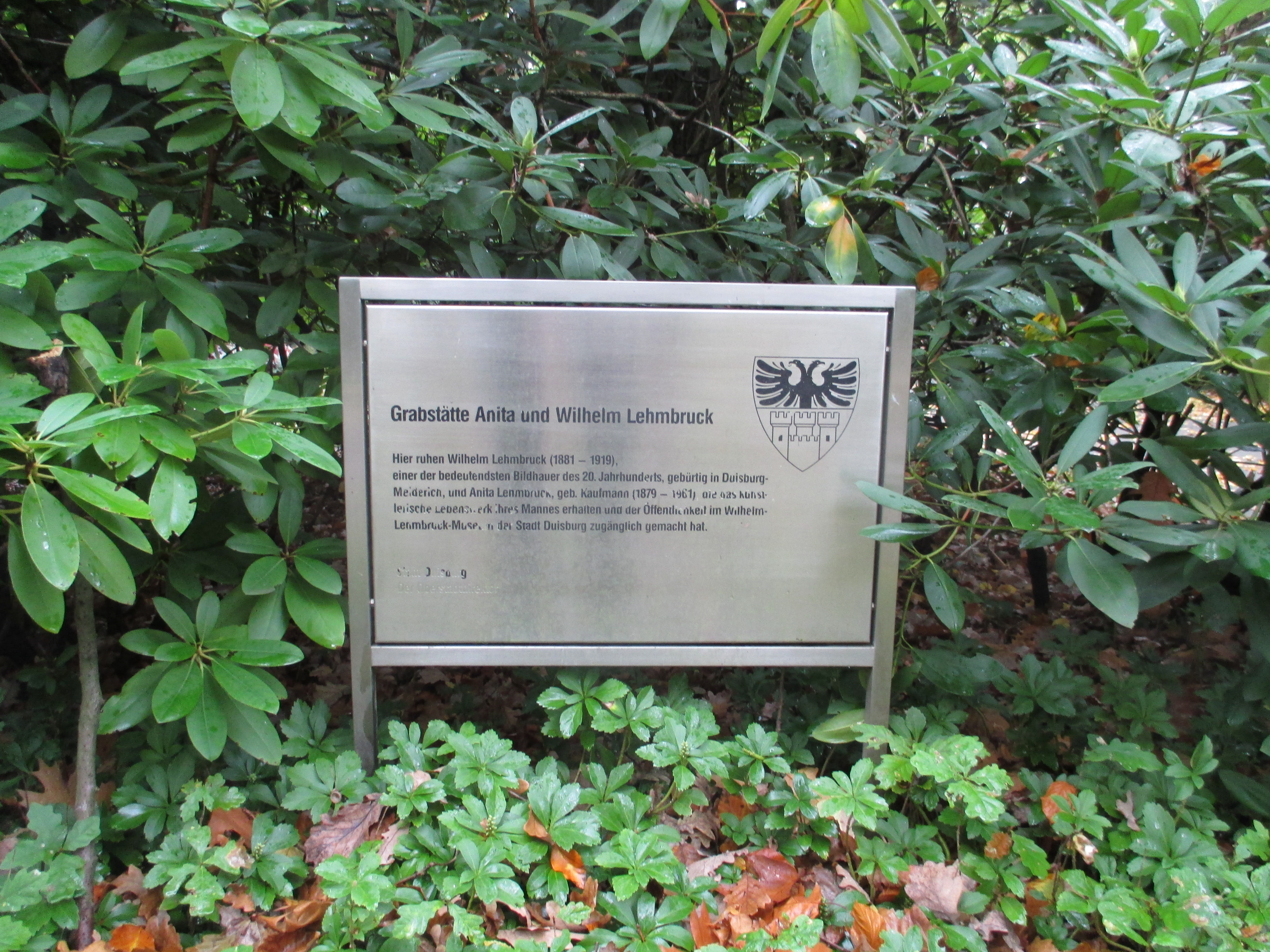 Infoschild am Grab von Wilhelm und Anita Lehmbruck. Der Künstler ist auf dem Waldfriedhof in Duisburg begraben.